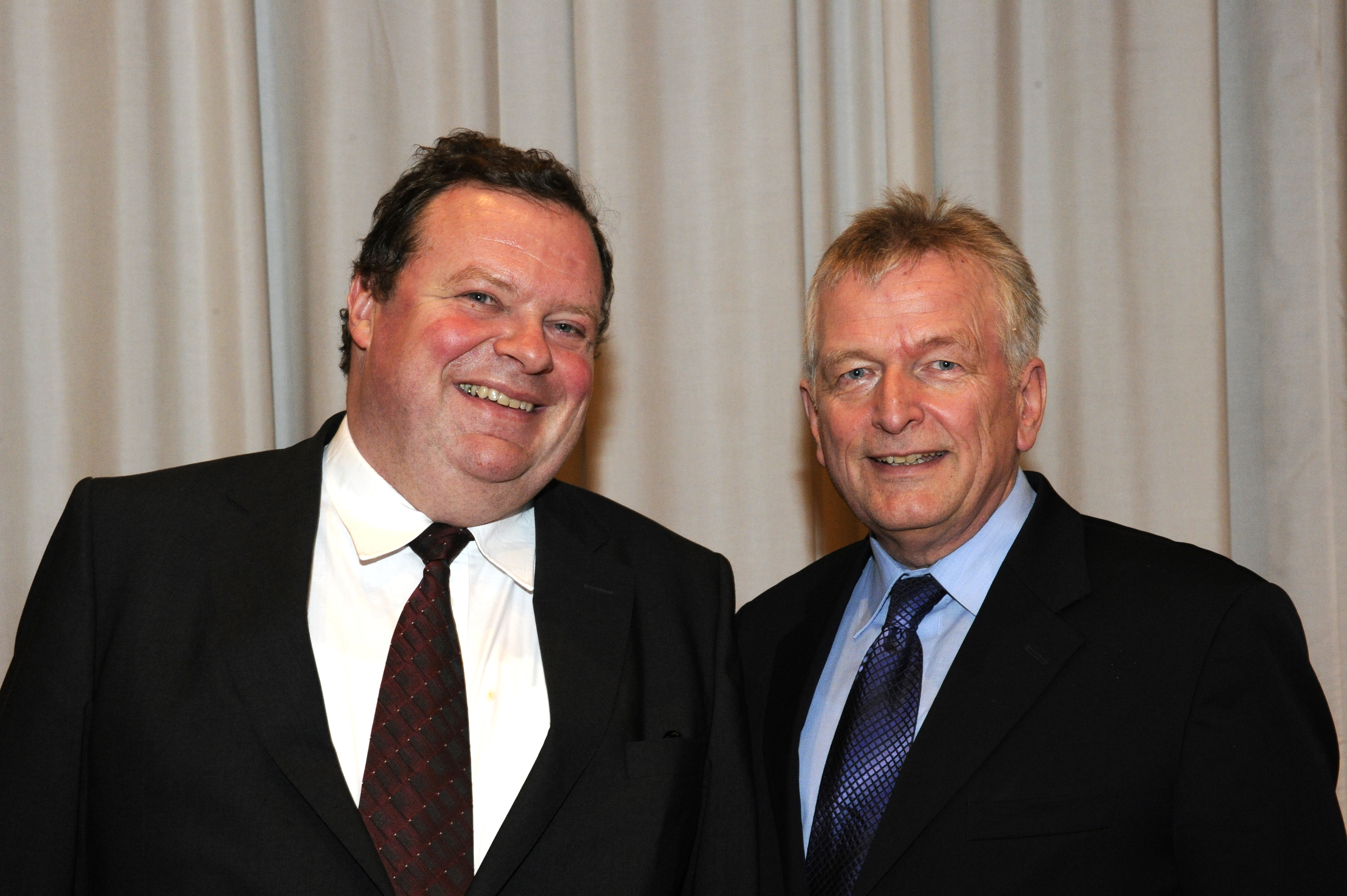 Max Strauß und Bill Holler